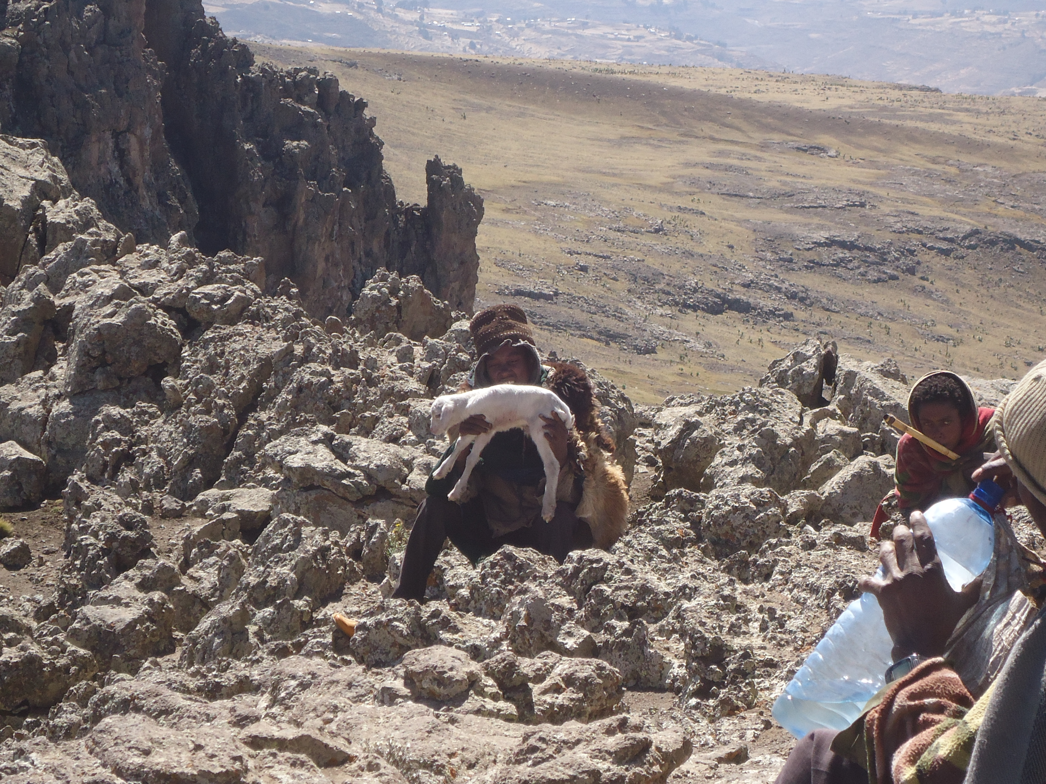 Hirtenkinder auf dem Gipfel des Ras Dejen (4.533m)